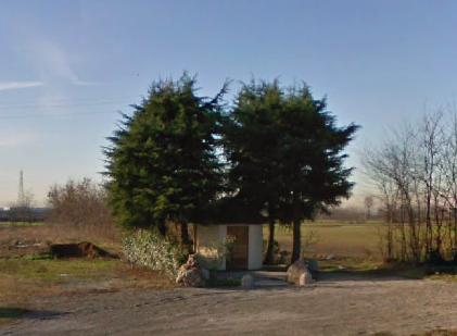 Cappella Il Crocione esterno